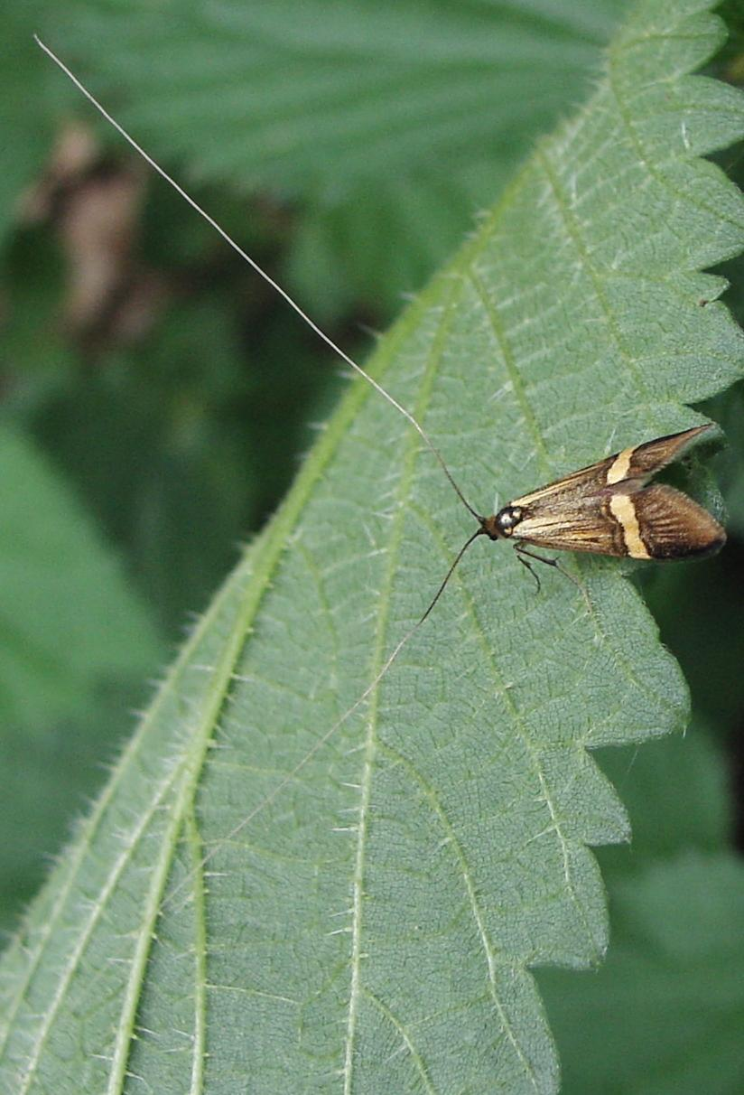 Male Nemophora degeerella from Rurtal, Germany.